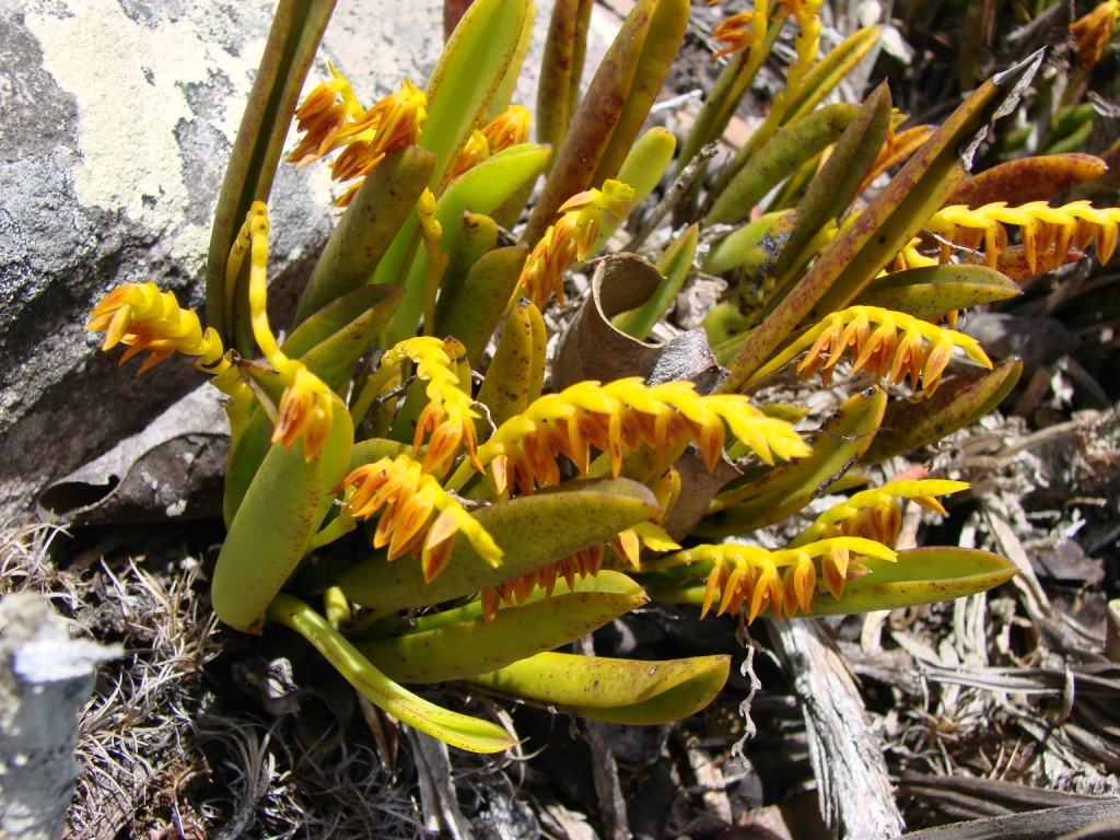 Acianthera ochreata - ORCHIDACEAE Parque Natural Municipal Morro do Pai Inácio - Palmeiras - Bahia - Brasil.